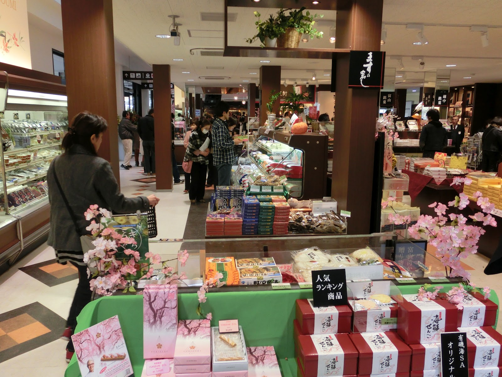 有磯海SA（魚津側 下り線 新潟方面）